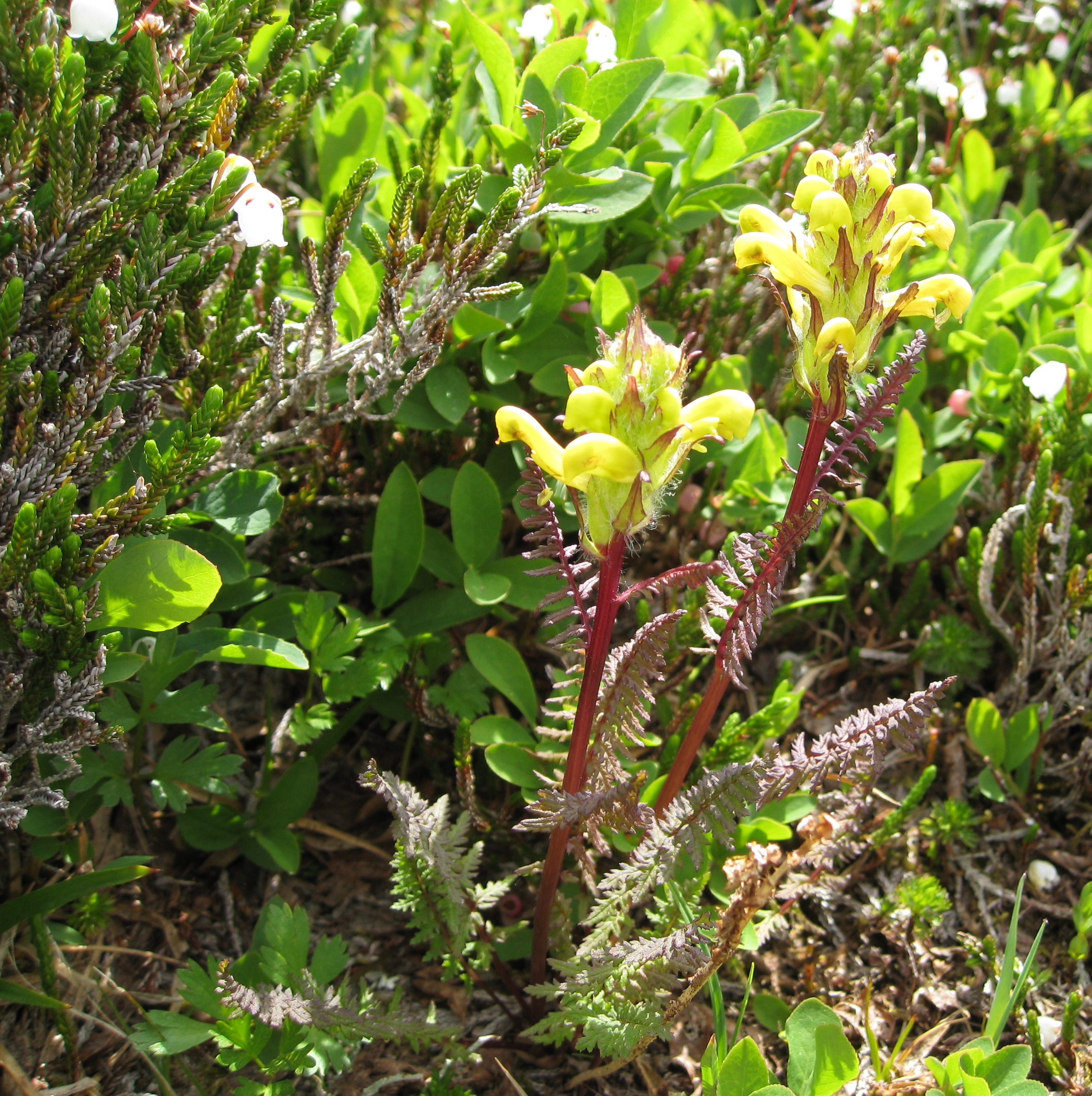 i090909 040